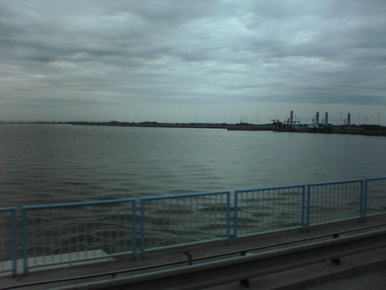 Gabčíkovo reservoir